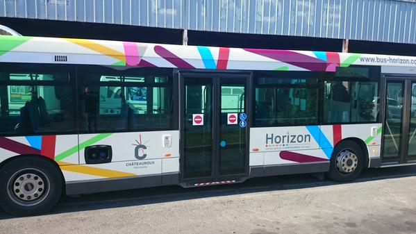 La nouvelle livrée Horizon (photo prise au dépôt)